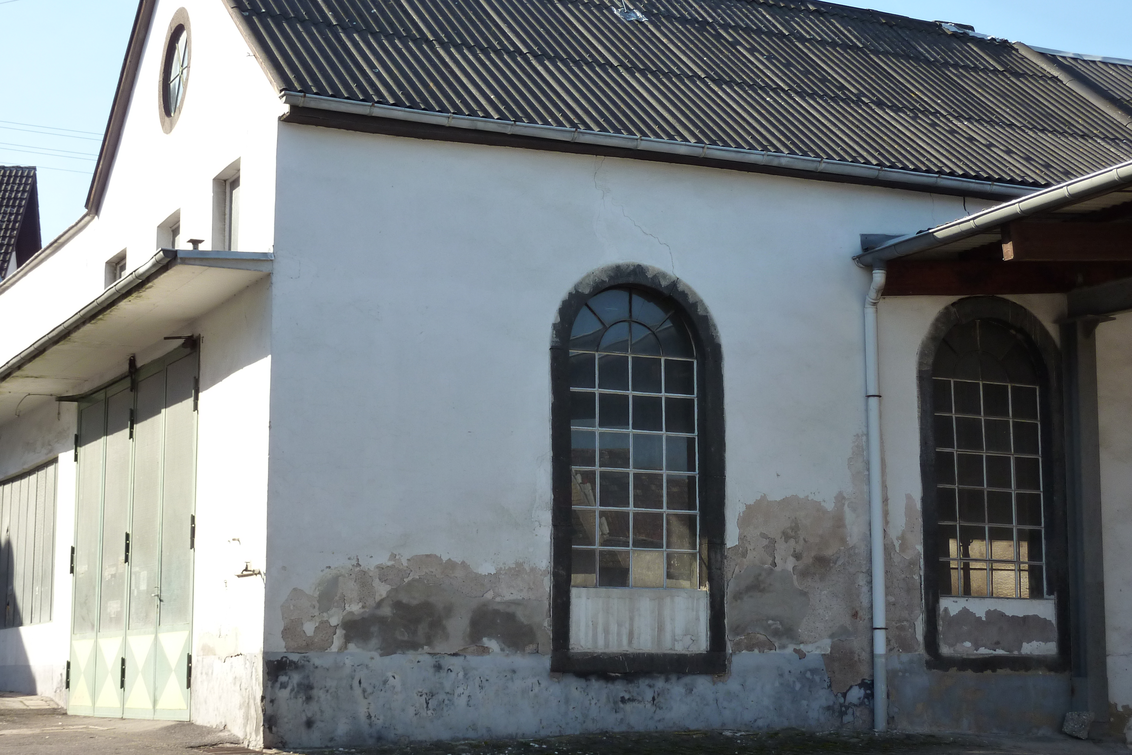 ehemalige Synagoge Niederzissen